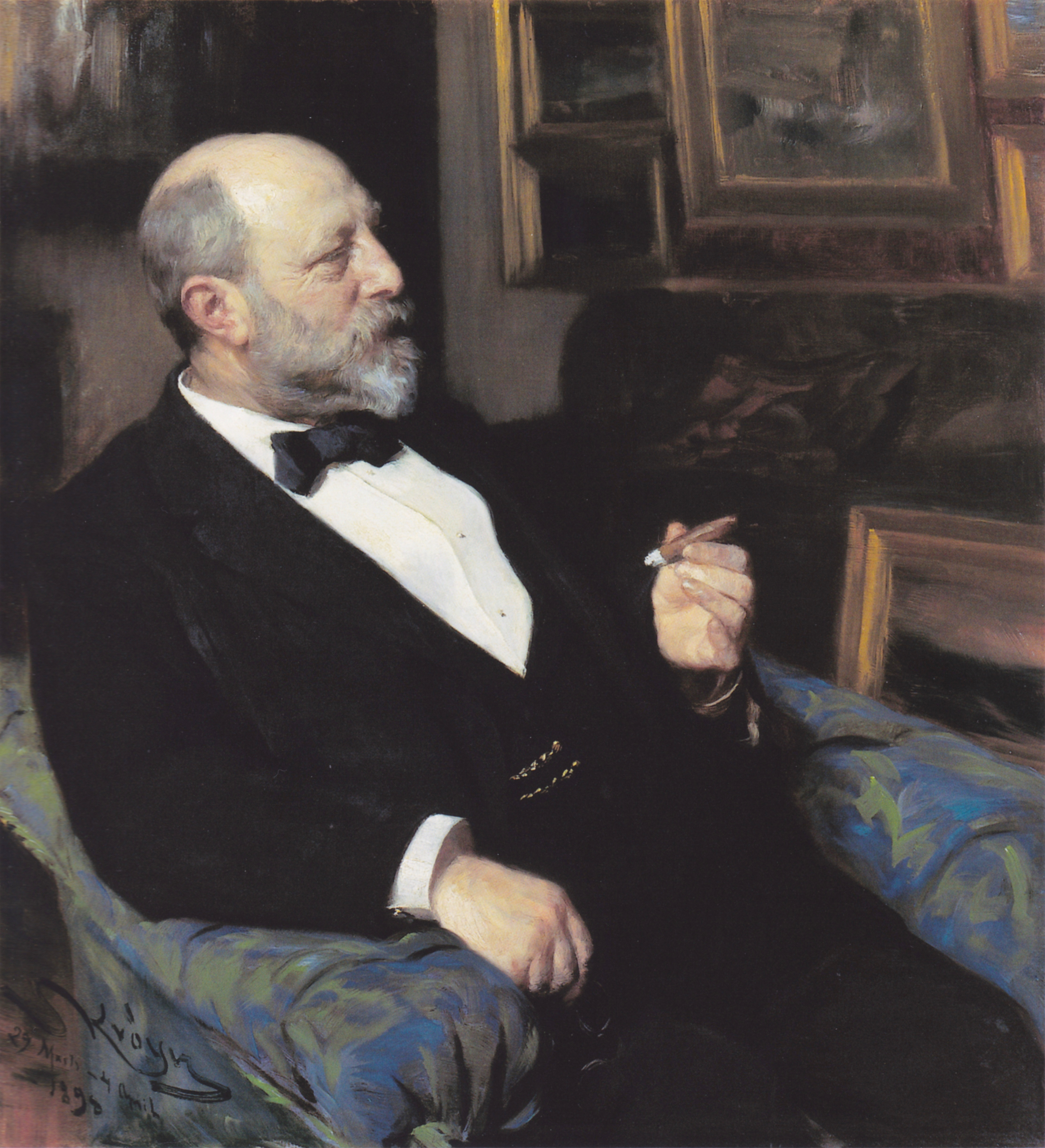 Heinrich Hirschsprunglabel QS:Lsv,"Heinrich Hirschsprung" label QS:Len,"Heinrich Hirschsprung" label QS:Lda,"Heinrich Hirschsprung"